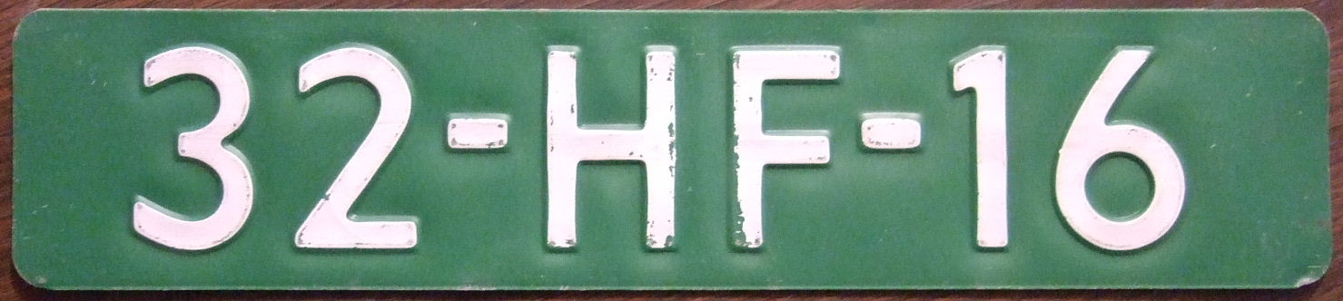 NETHERLANDS DEALER PLATE